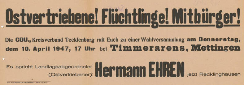 Ostvertriebene! Flüchtlinge! Mitbürger! Die CDU, Kreisverband Tecklenburg ruft Euch zu einer Wahlversammlung ... Es spricht Landtagsabgeordneter (Ostvertriebener): Hermann Ehren jetzt Recklinghausen Plakatart: Ankündigungsplakat Auftraggeber: CDU-KV Tecklenburg Drucker_Druckart_Druckort: Bernh. Scholten, R. D.1168a, Ibbenbüren - März 47. 347/195. B. Objekt-Signatur: 10-009 : 57 Bestand: Landtagswahlplakate Nordrhein-Westfalen (10-009) GliederungBestand10-18: Landtagswahlplakate Nordrhein-Westfalen (10-009) » Landtagswahl am 20.4.1947 » CDU » Ankündigungsplakate Lizenz: KAS/ACDP 10-009 : 57 CC-BY-SA 3.0 DE